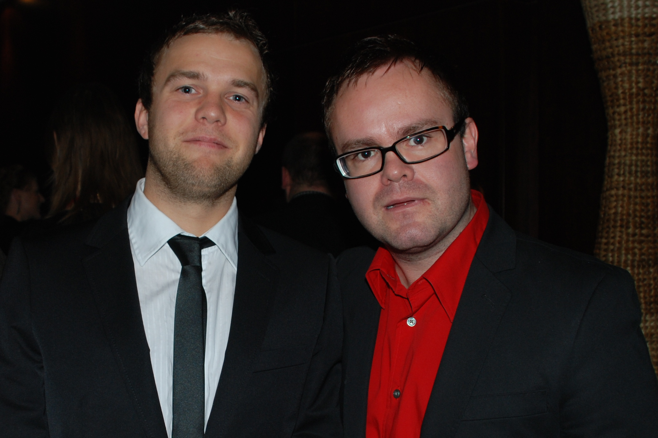 Hugi Halldórsson (til vinstri) og Pétur Jóhann Sigfússon (til hægri) á Edduverðlaununum árið 2007